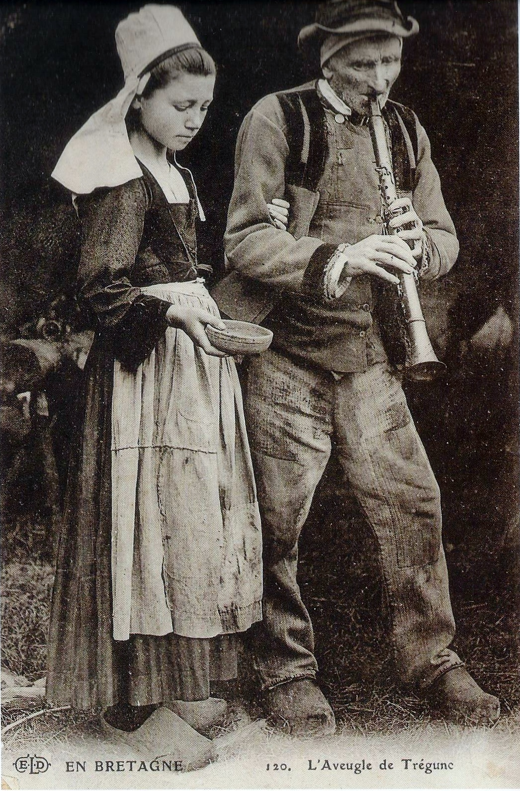 Aveugle de Trégunc jouant de la Dreujenn Gaol (clarinette bretonne) et sa femme tendant la sébile.